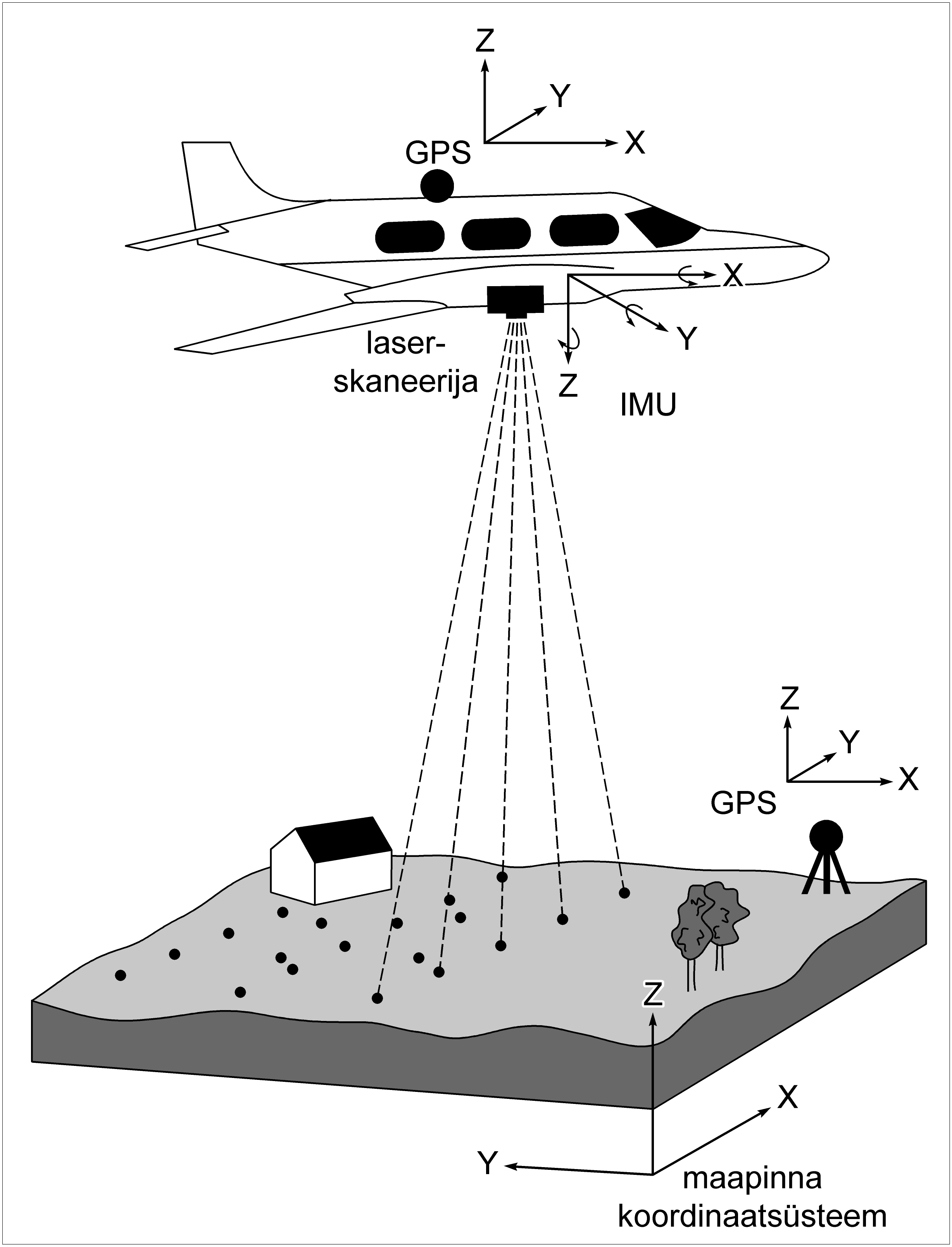 Aerolaserskaneerimise põhimõte ja mõõdistussüsteemi osad (Lillesand & Kiefer 2009 järgi)